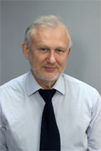 Владимир Васильевич Абашев